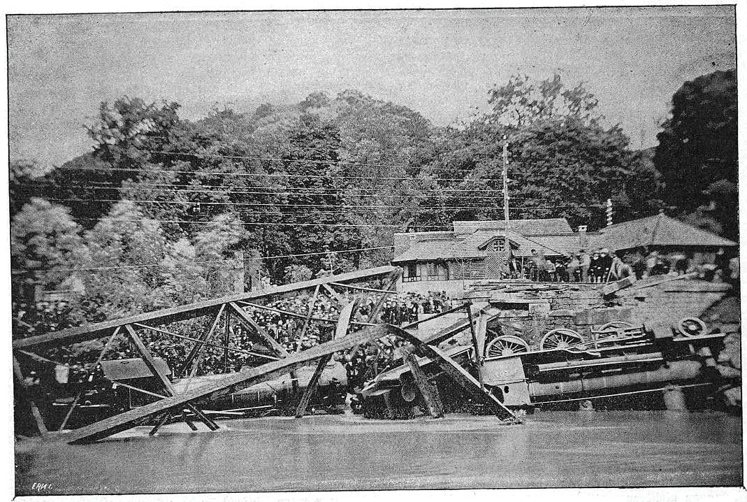 Einsturz der Eisenbahnbrücke bei Münchenstein: Rechtsseitiges Widerlager und Trümmerfeld bis zur Flussmitte. Aufnahme vom 16. Juni